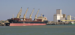 Quai céréalier et silos - Port de La Pallice - La Rochelle Photo issue de ma banque d'images personnelle : Pep.per